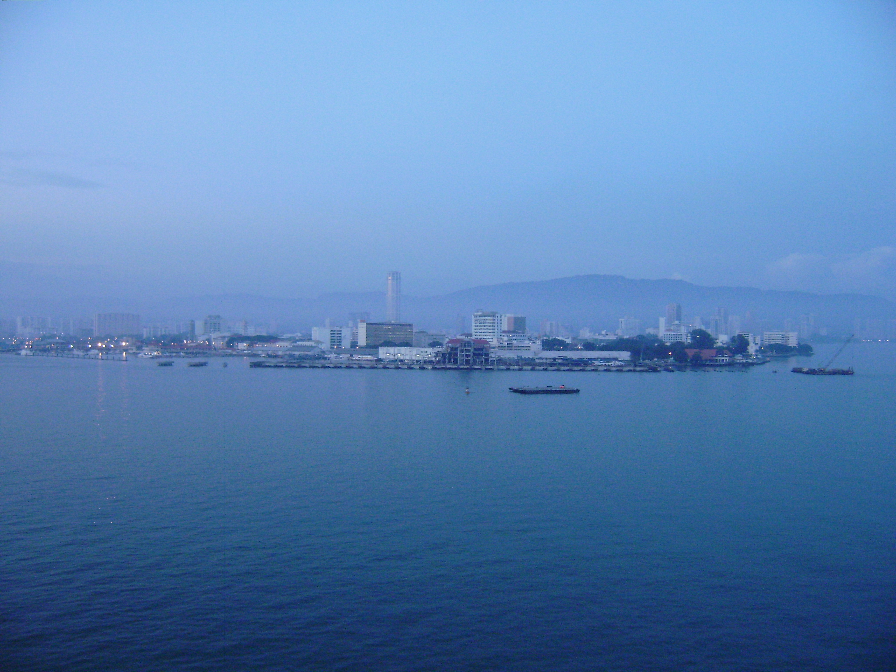 Penang at dawn